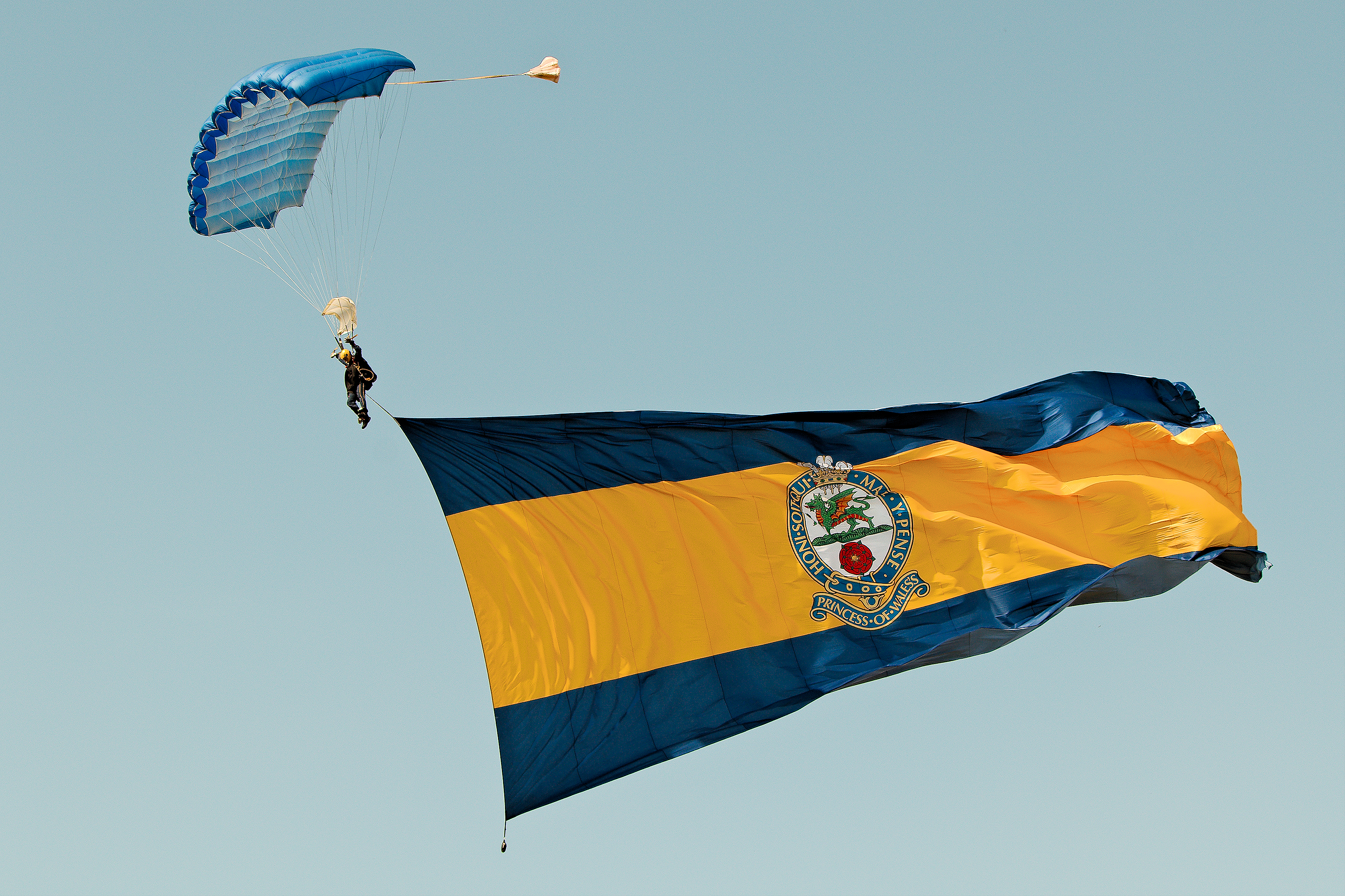 Tiger Army Parachute Display Team - Little Gransden